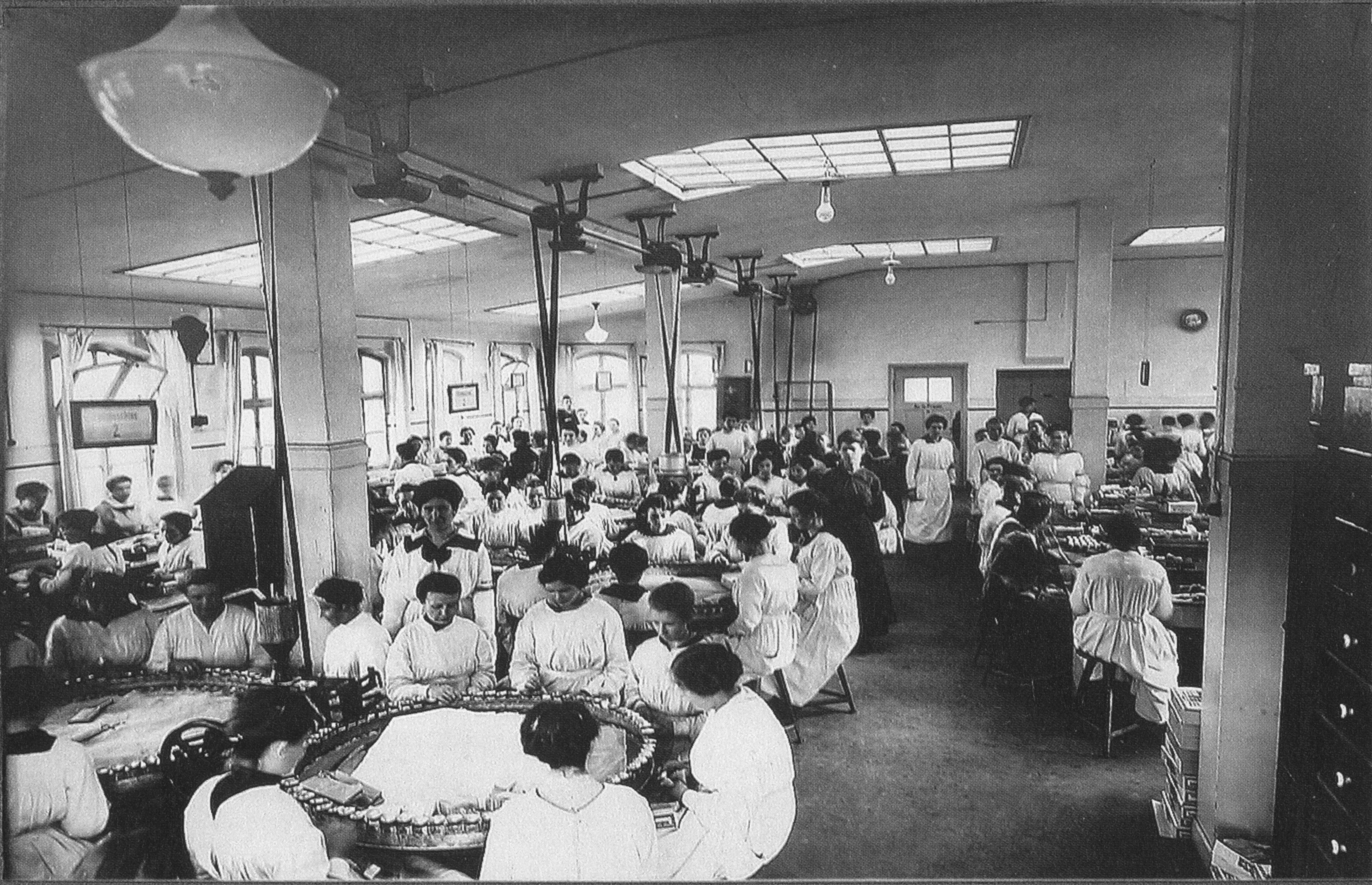 Frauen bei der Süßstoffabfüllung im Tablettenhaus von Fahlberg & List